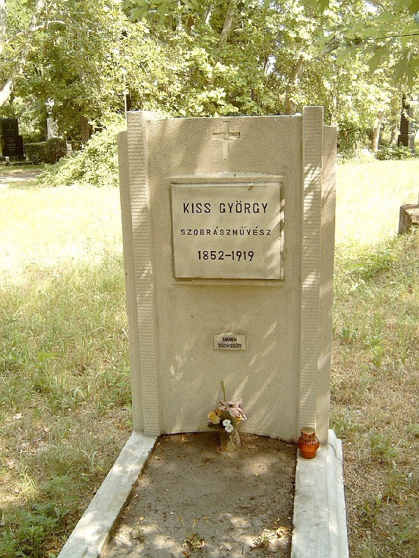 Kiss György szobrászművész (1852-1919) sírja Budapesten, Kerepesi temető: 27/1-1-36